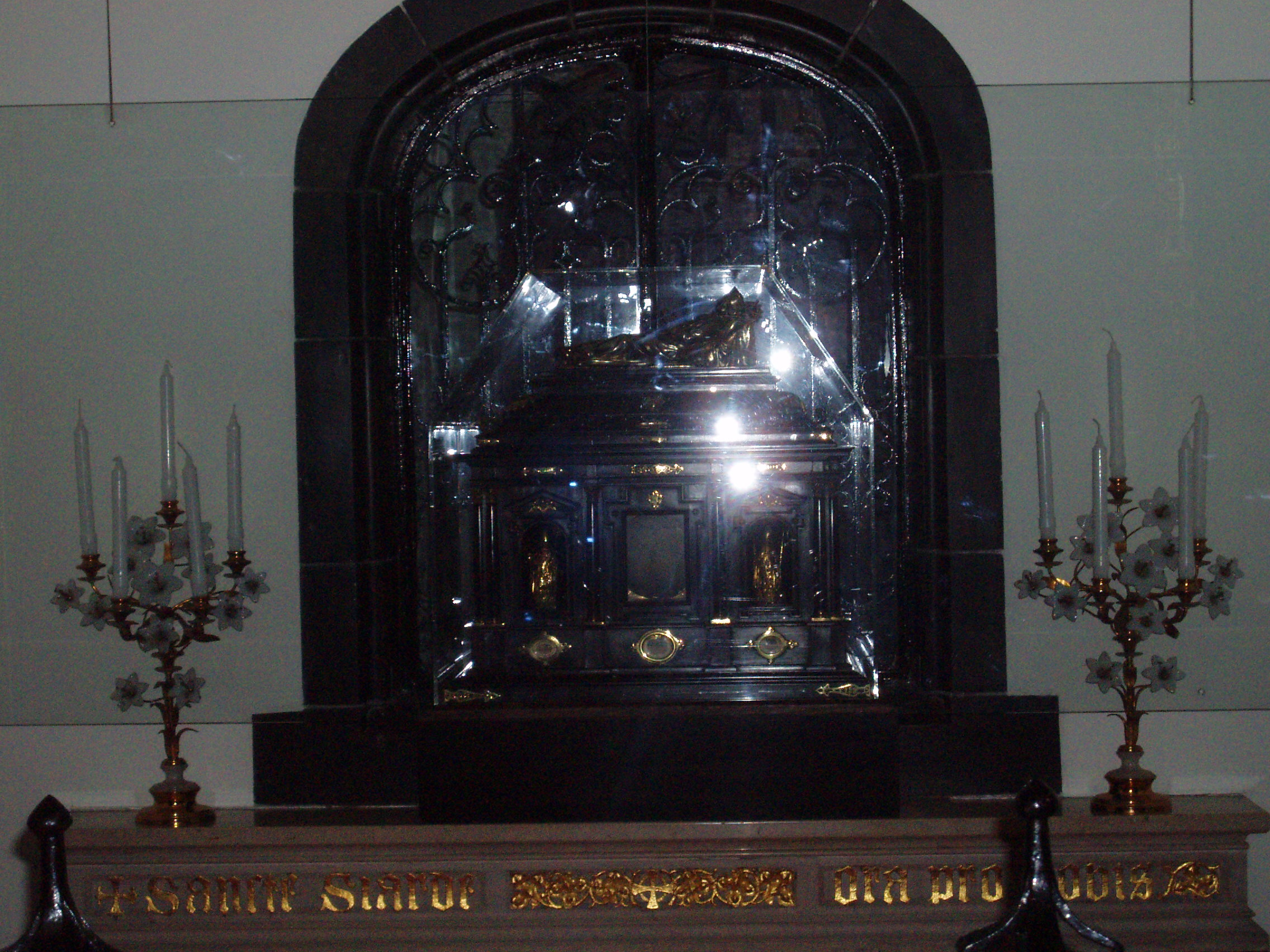 Reliekschrijn Sint Siardus te Tongerlo